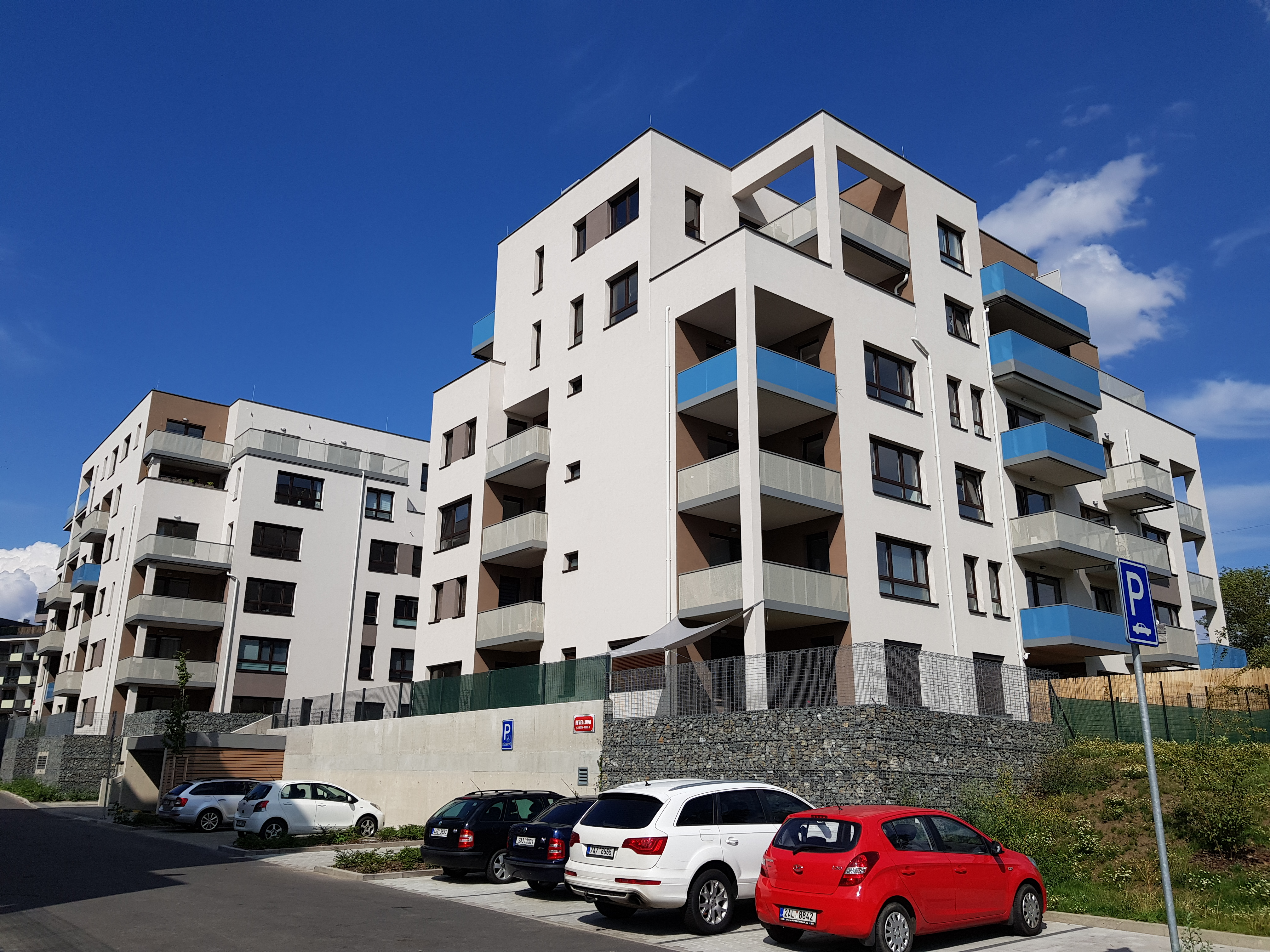 Domy čp. 1129/5 a 3 developerského projektu Oulu, Suomi Hloubětín, pohled severovýchodním směrem z ulice Revellova, Praha 9-Hloubětín